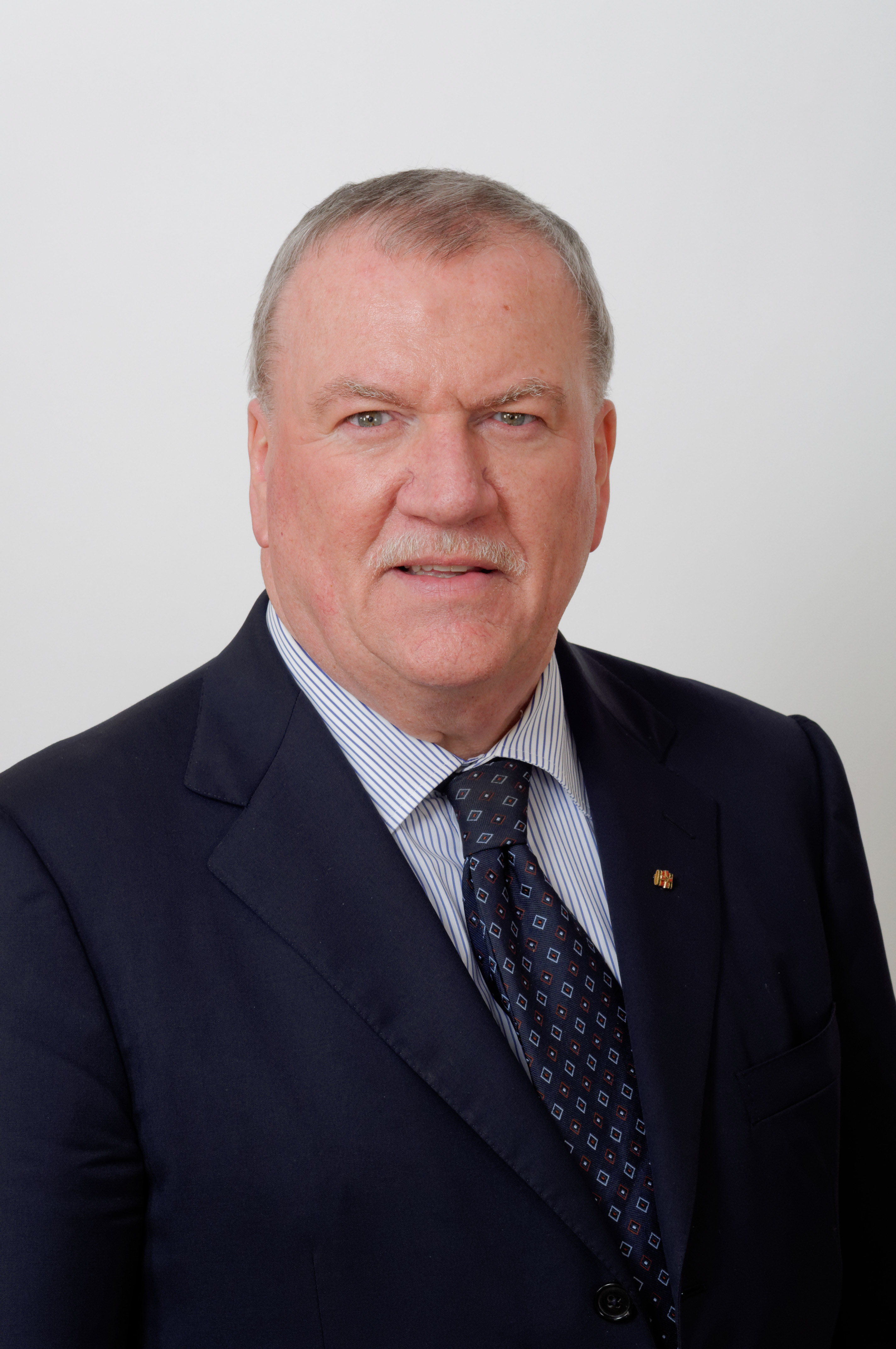 Landtagsprojekt Hessen